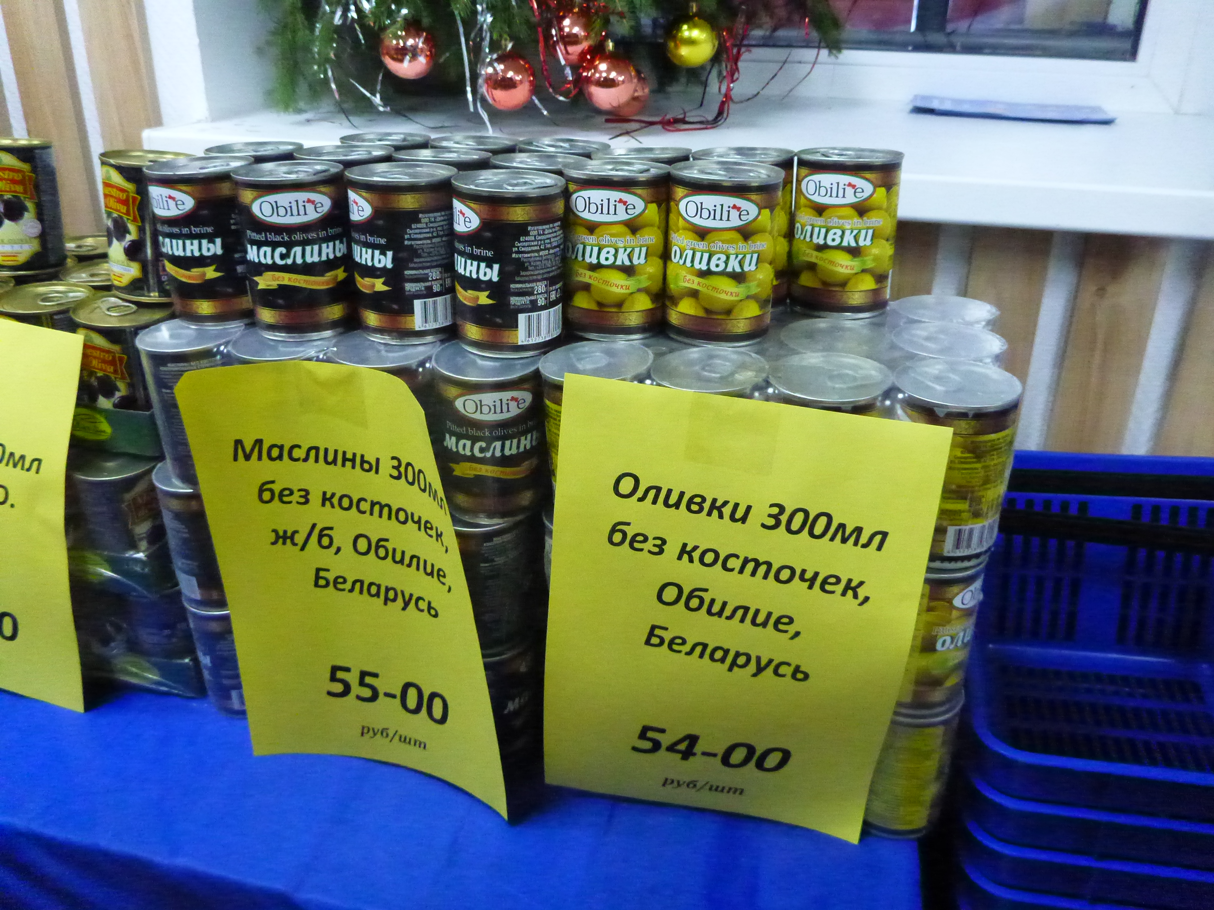 Белорусские маслины и оливки (изготовлены фирмой Вастега по заказу фирмы из Свердловской области) в магазине Екатеринбурга 23 декабря 2019 года